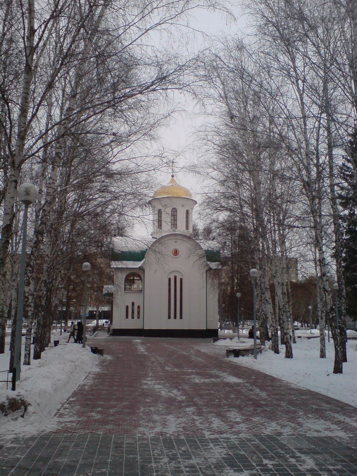 La kapelo honore al la sanktulo Dmitrij Donskoj (Tjumeno, Rusio)